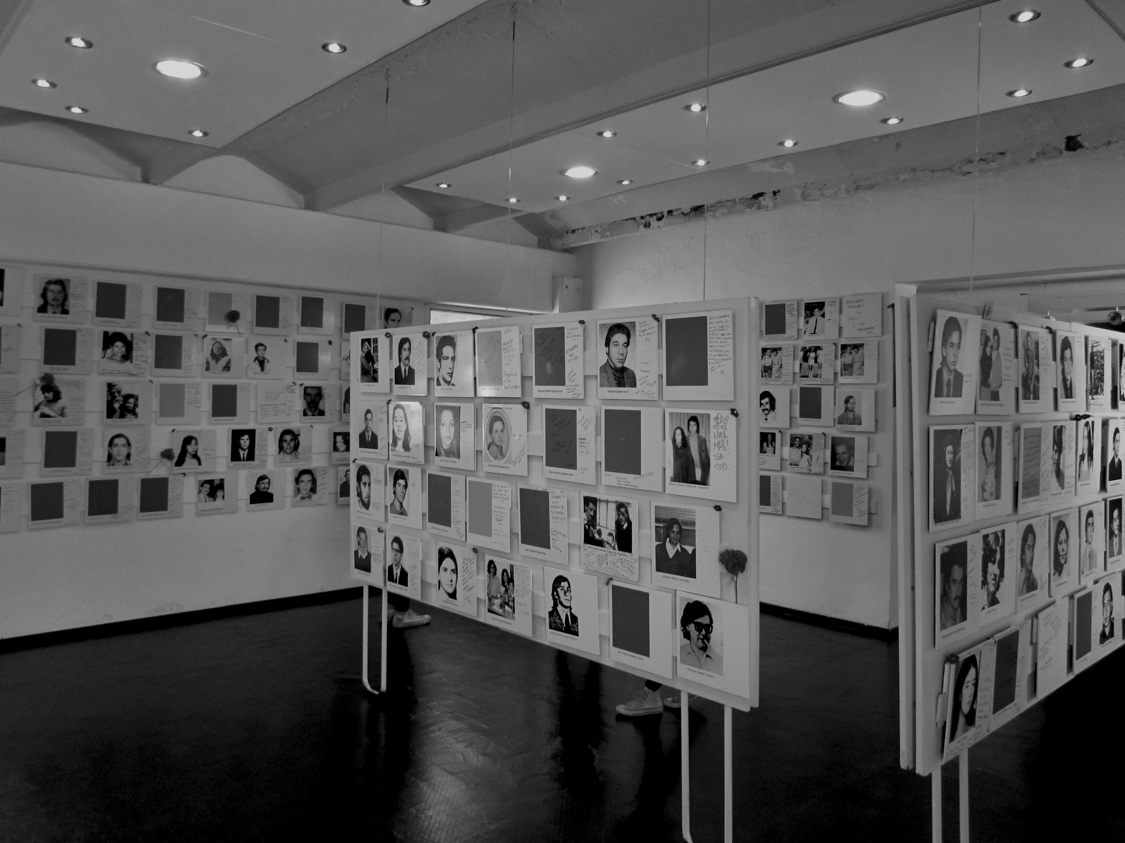 Espacio Para La Memoria La Perla